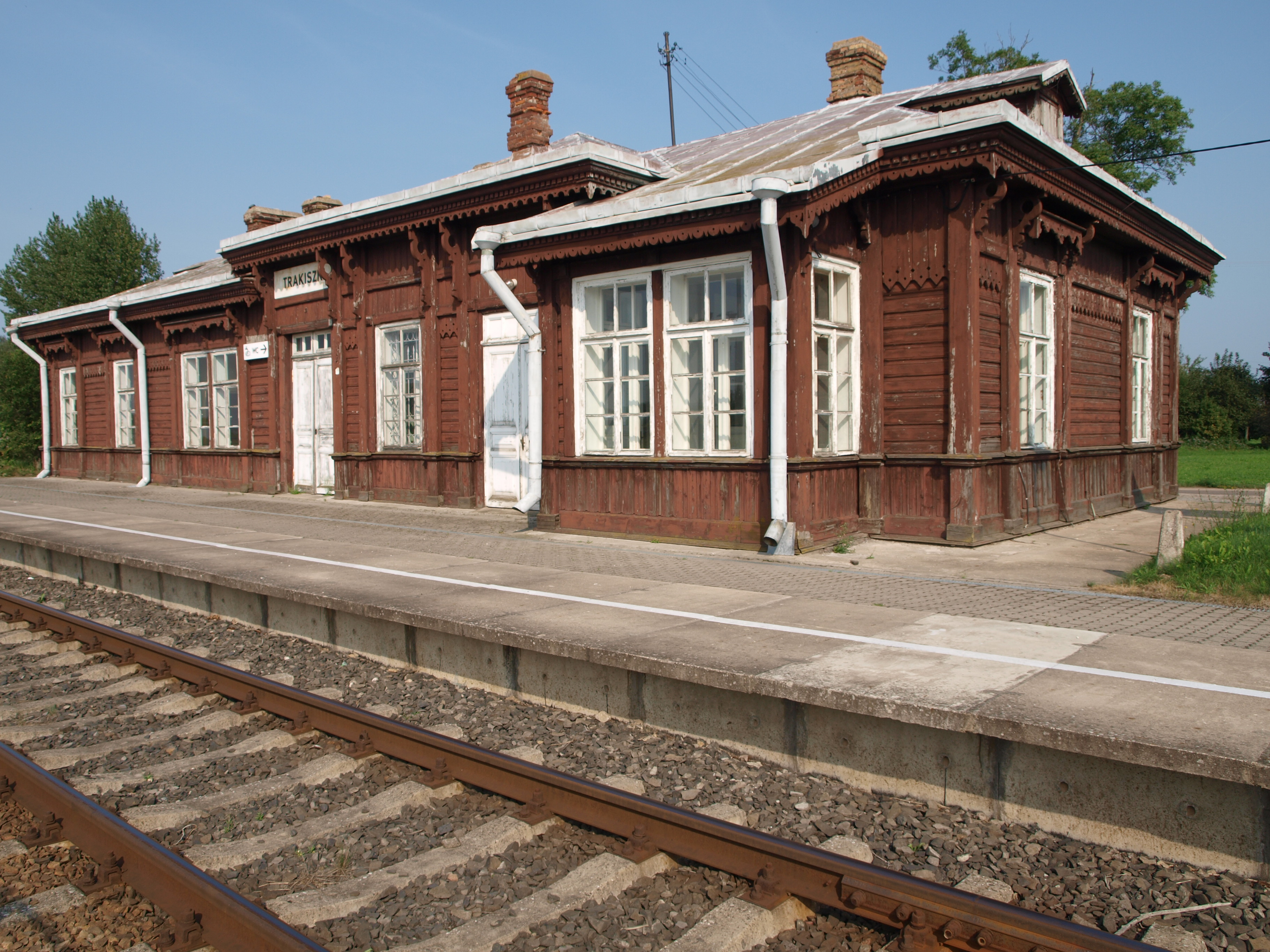 Stary budynek stacji kolejowej w Trakiszkach